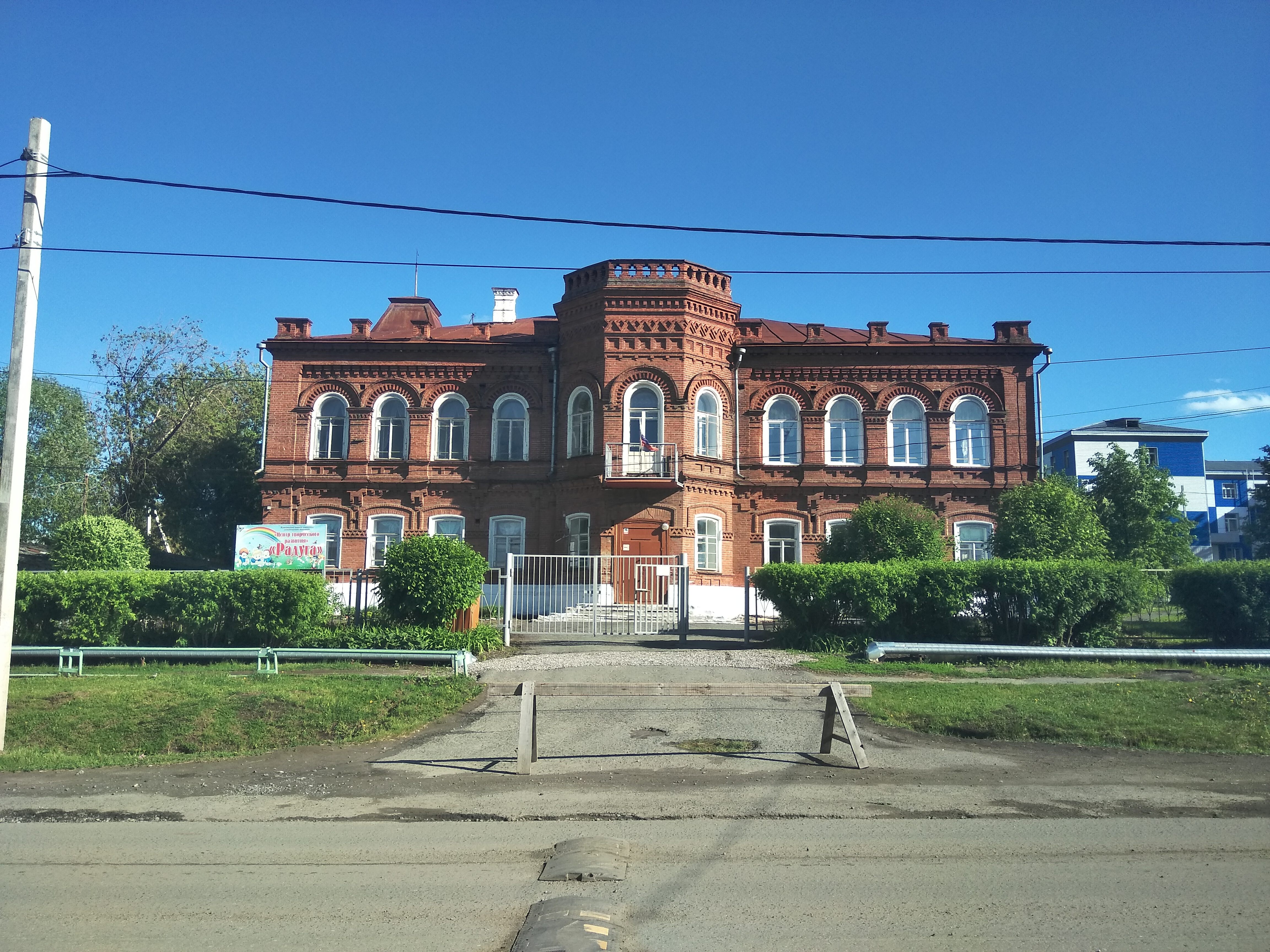 Имение Поклевских-Козелл. Главный дом: улица Ленина, 38, Талица, Талицкий район, Свердловская область